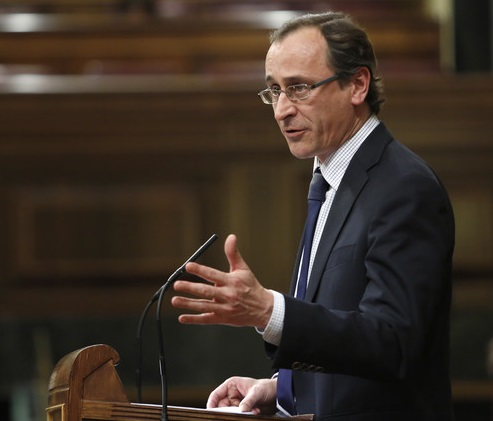 Madrid 18-02-2014 Pleno del Congreso. En la foto intervencion de la portavoz del PP, Alfonso Alonso. Imagen Juan Manuel Prats